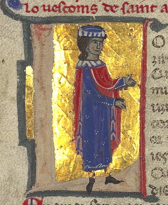 Raimon Jordan